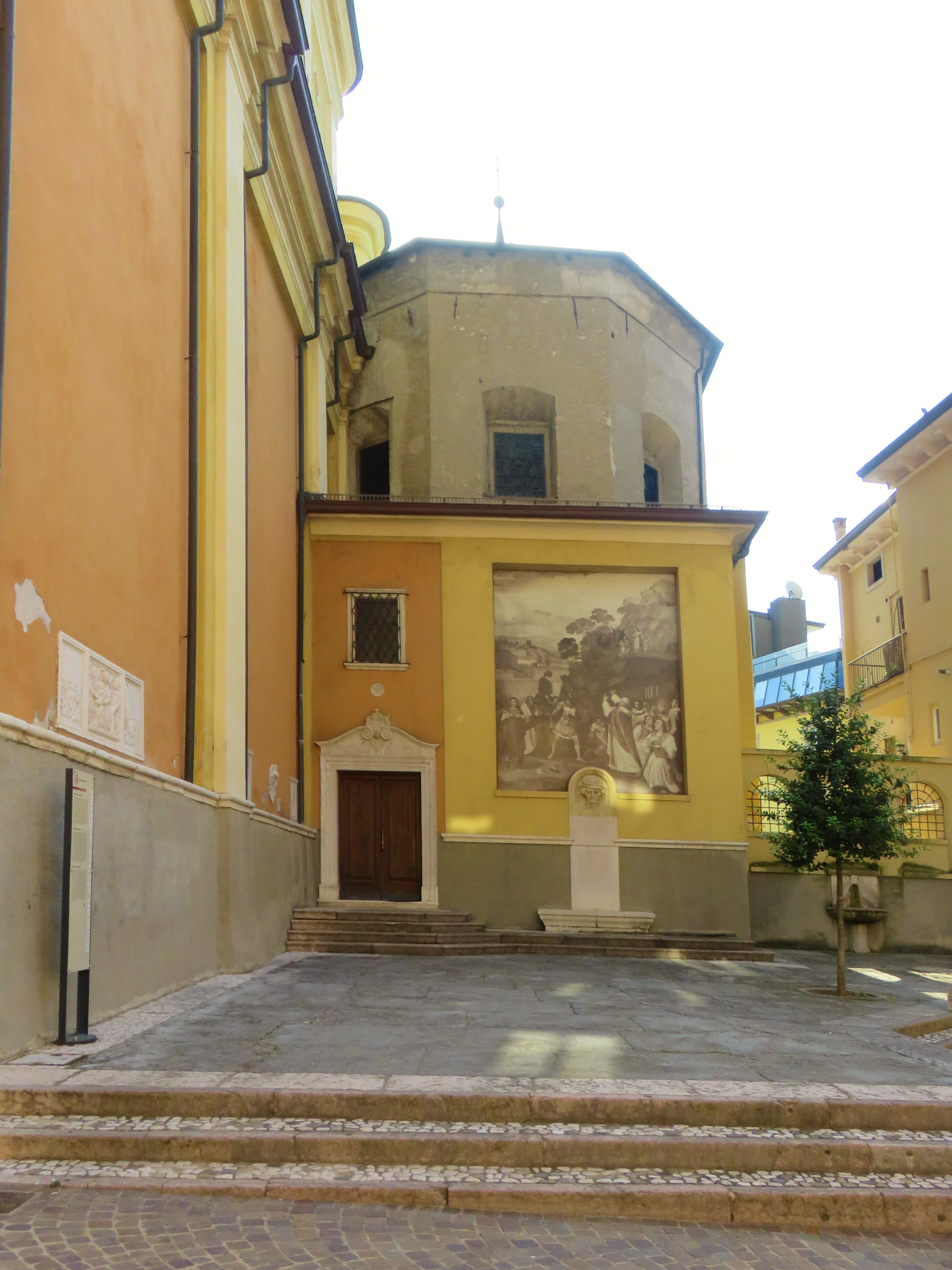 Chiesa di Santa Maria Assunta. Lato sud. Piazzetta Graffonara.